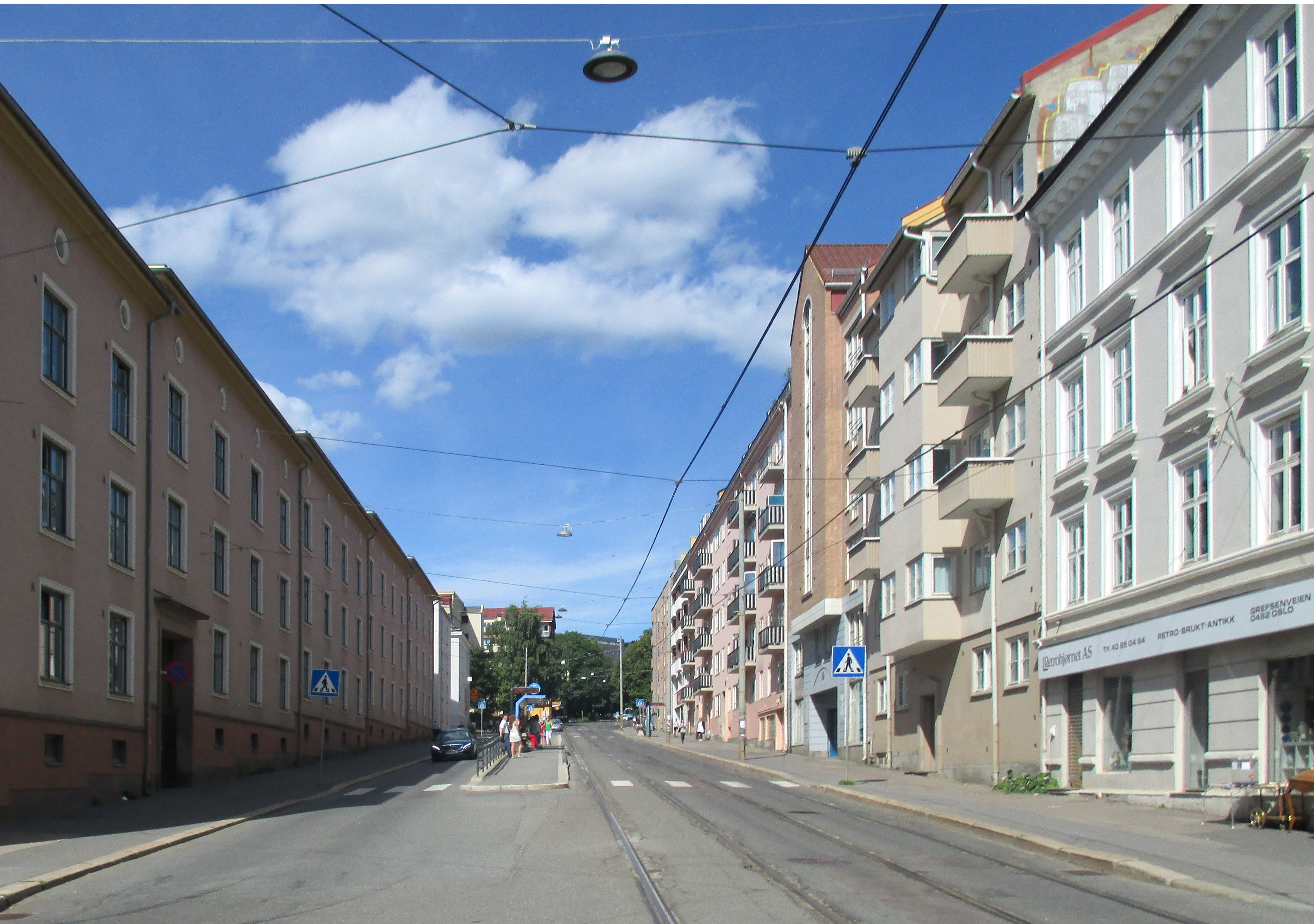 Grefsenveien på Sandaker